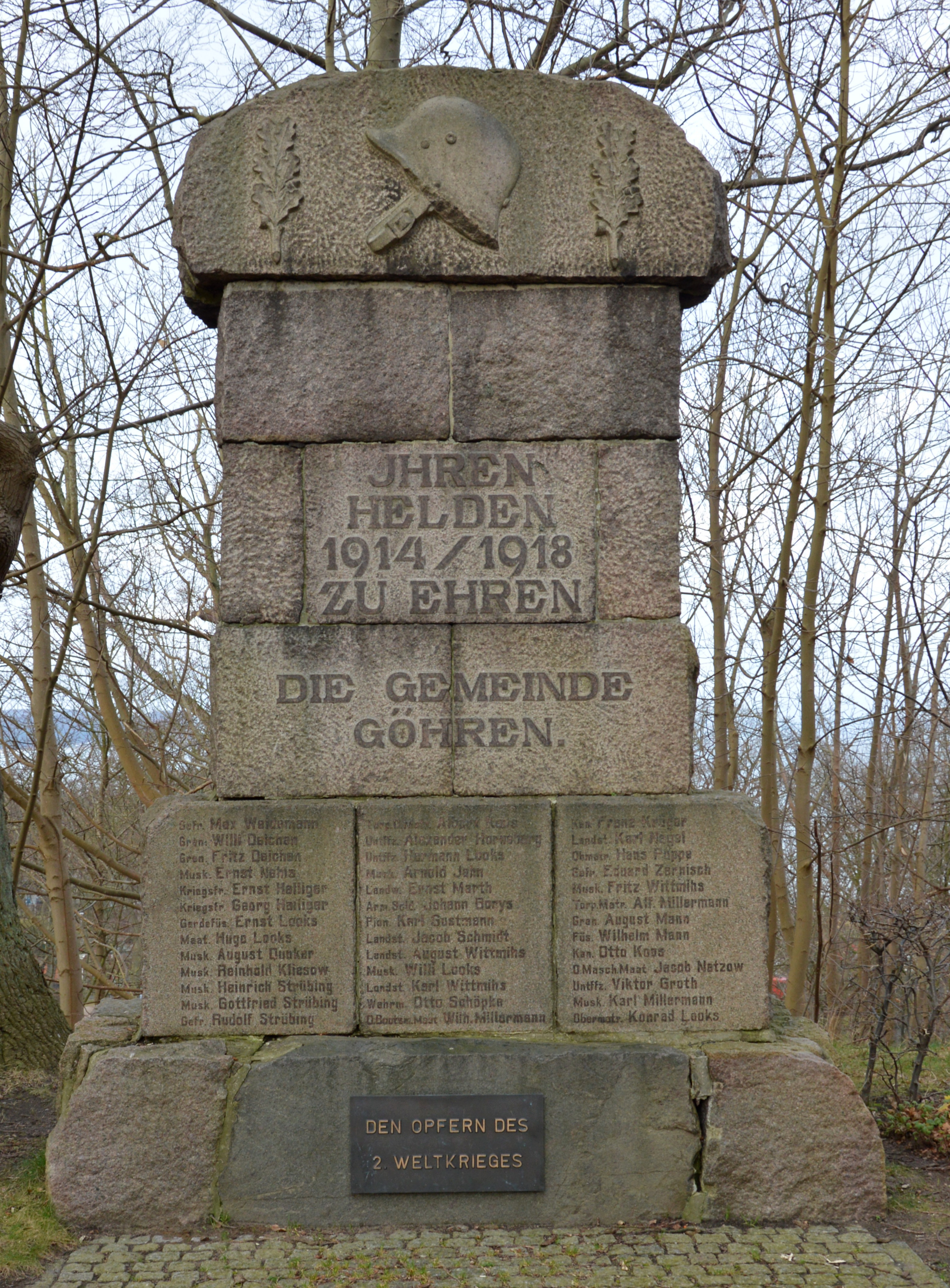 Kriegerdenkmal Göhren